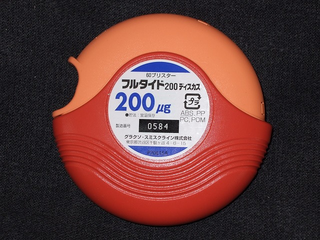 フルタイド ディスカスを撮影